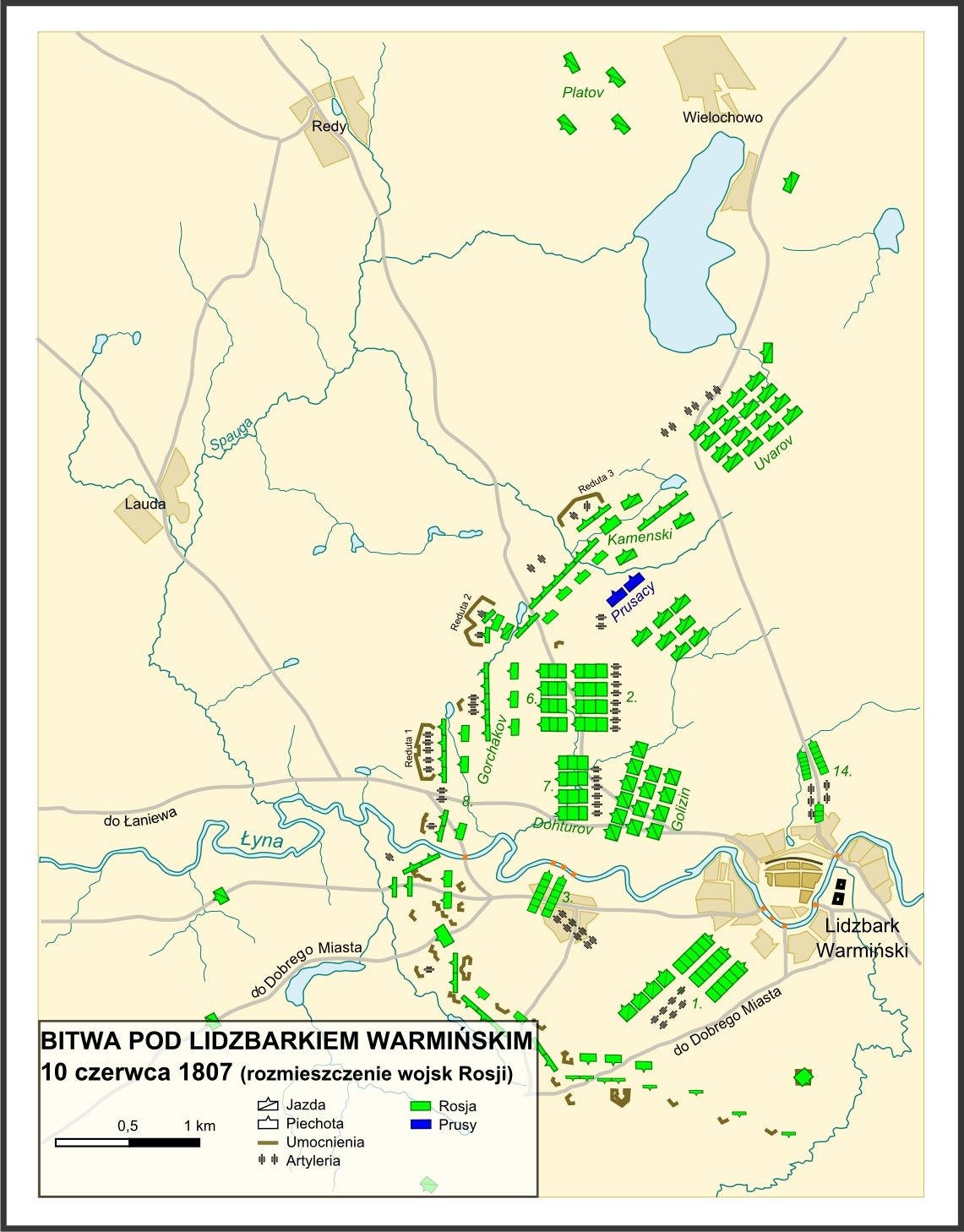 Pozycje wojsk rosyjskich przed rozpoczęciem bitwy pod Heilsbergiem